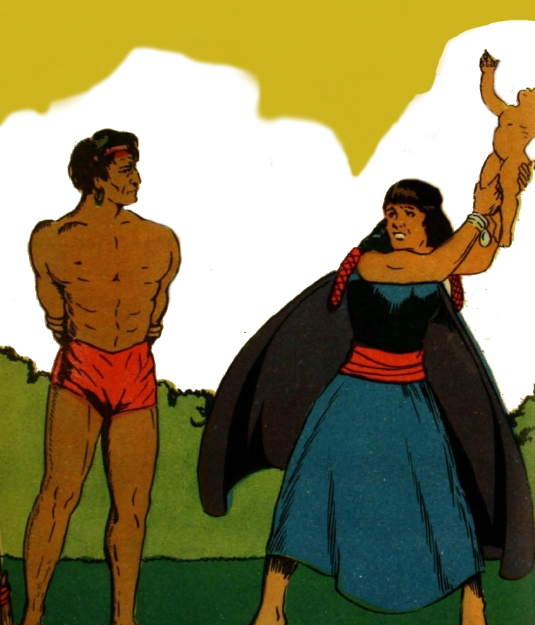 Fresia hace su aparición en el momento en que Caupolicán es capturado por las tropas españolas en el combate de Antihuala (5 de febrero de 1558). Al verlo así, derrotado, siendo conducido por un piquete al fuerte de Tucapel, Fresia, presa de la ira, le habría enrostrado el haberse dejado capturar vivo, le habría arañado el rostro dando alaridos de rabia y, finalmente, en un ataque de furia, habría arrojado el hijo de un año de ambos sobre un peñasco, destrozándolo